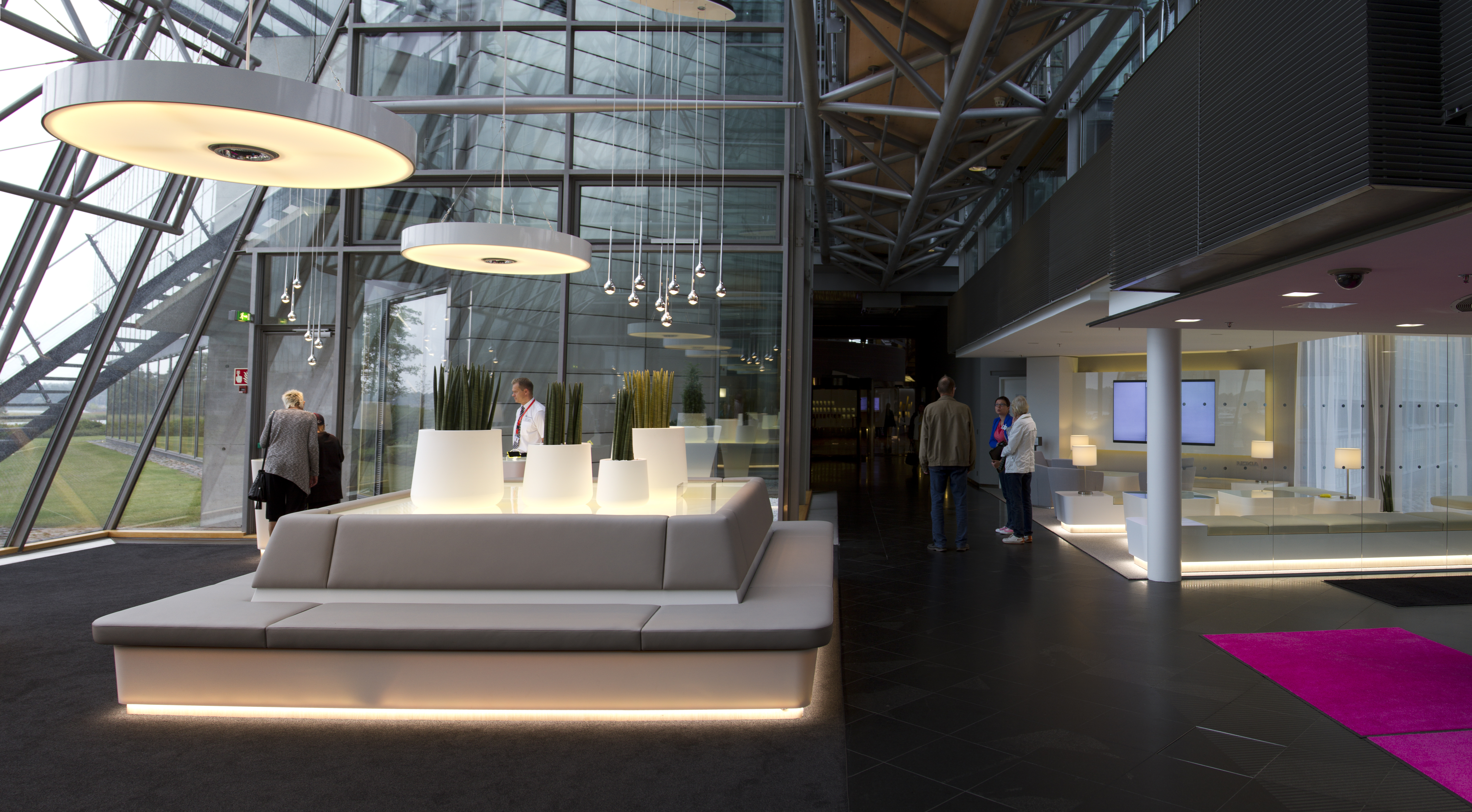 Nokian pääkonttori, pääaula